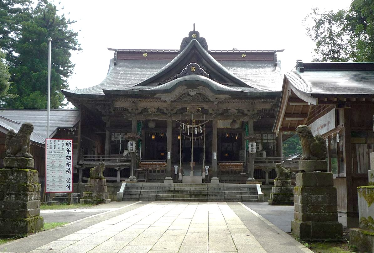 蒼柴神社拝殿